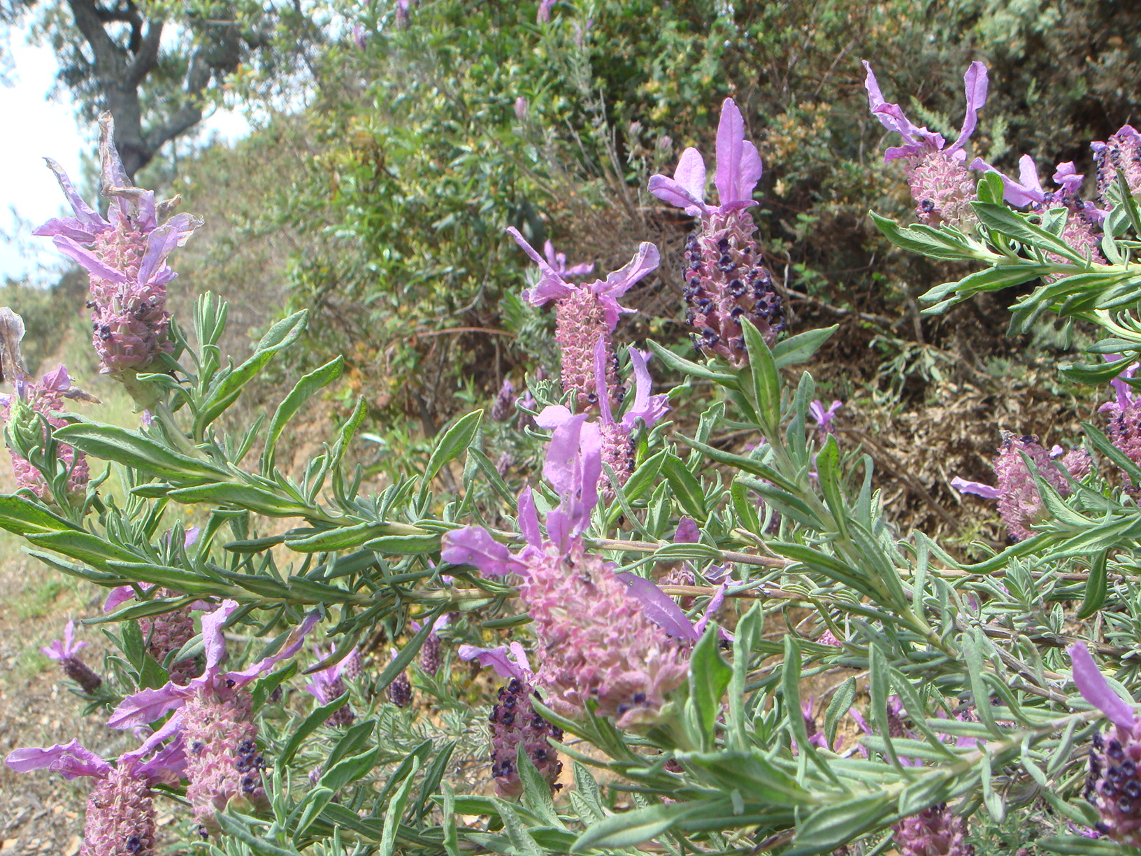 Lavandula stoechas, Alájar, Huelva, España